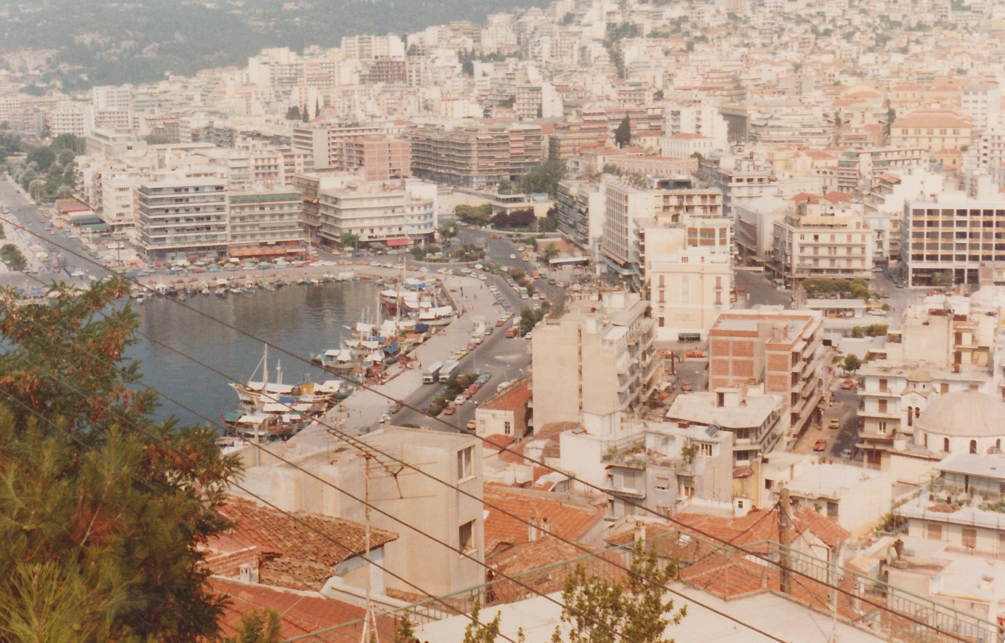 Kavala Greece